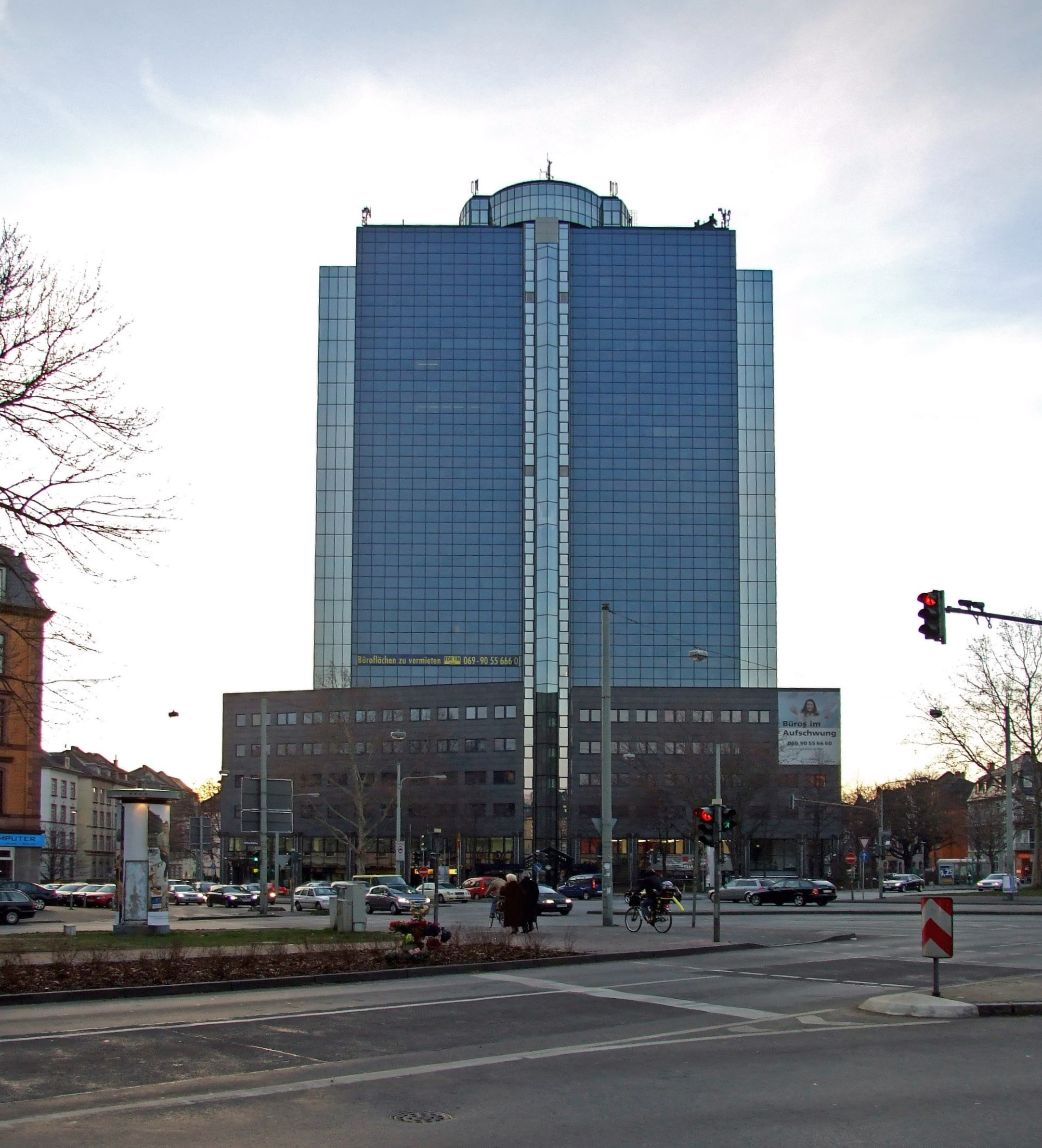 Buero-Center am Nibelungenplatz